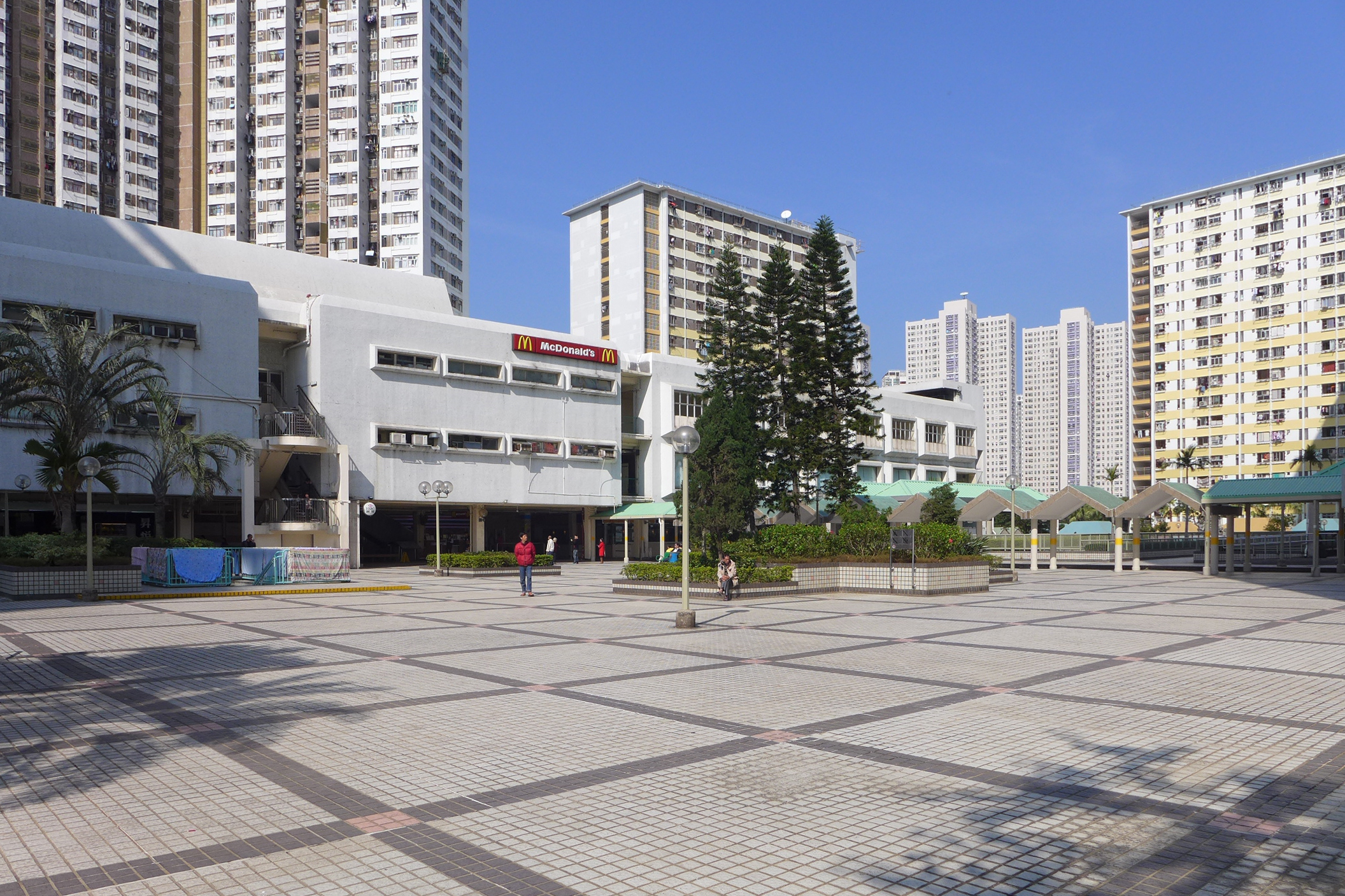 Kwong Fok Shopping Centre